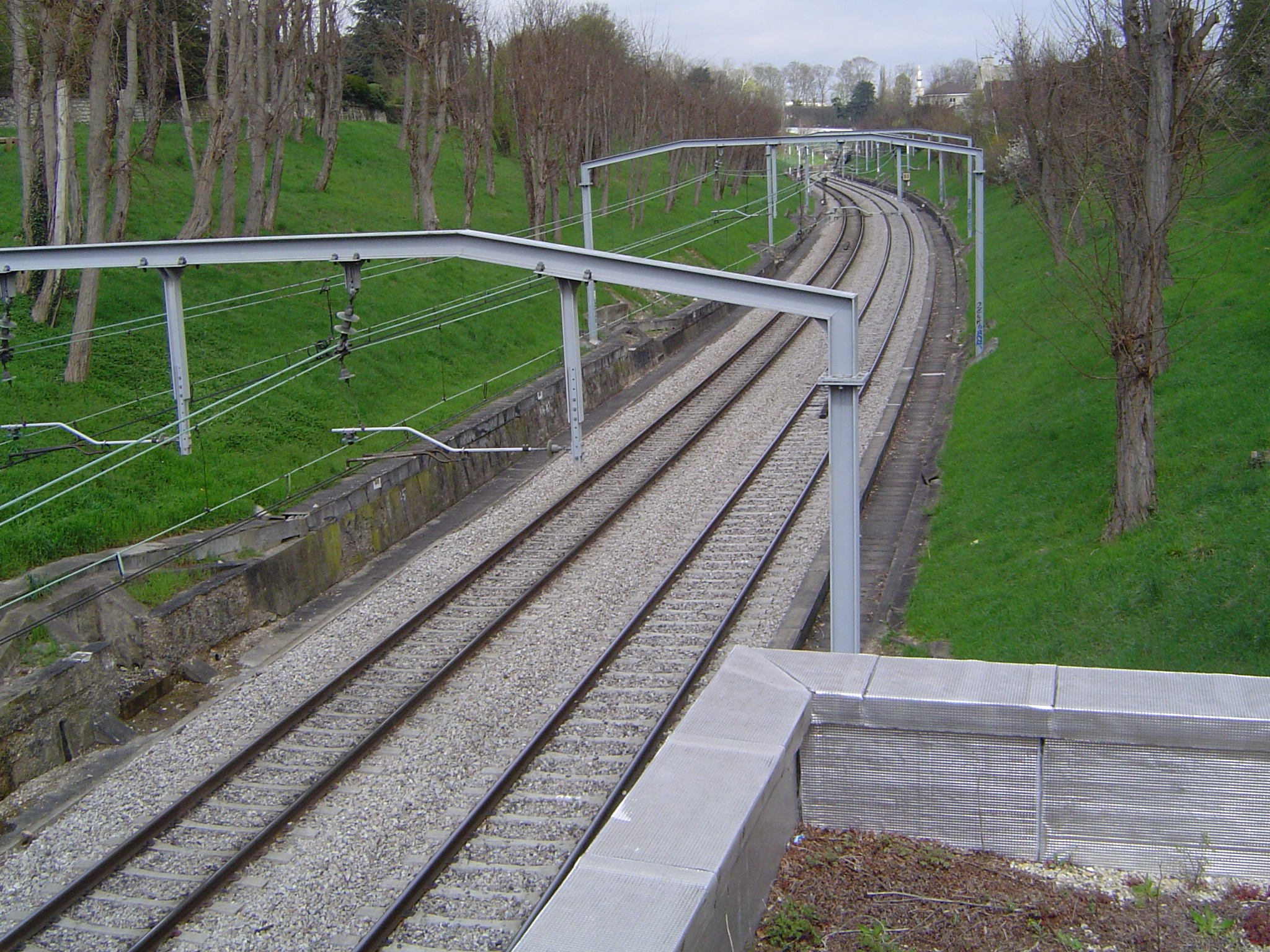 Photo de la gare du RER "Parc de Sceaux"